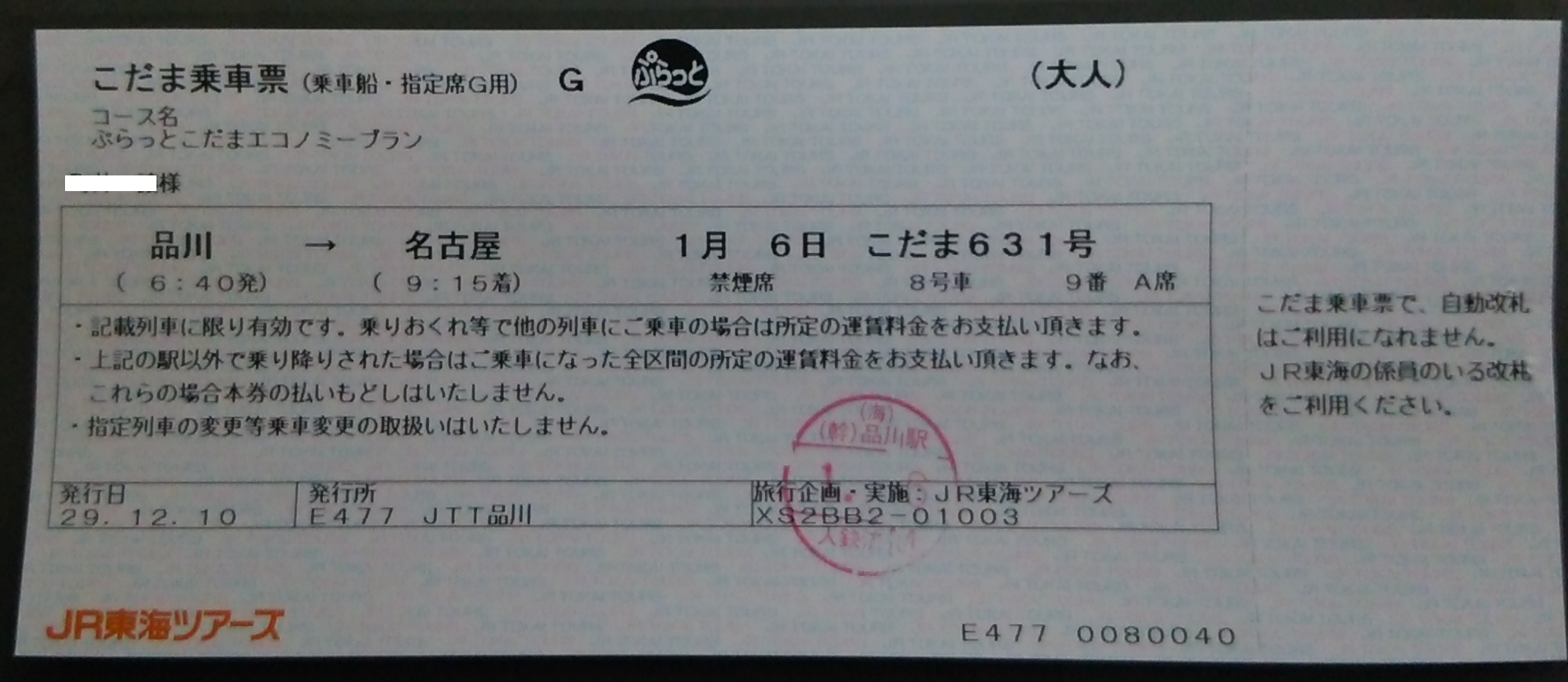 新幹線こだま号の旅行商品「ぷらっとこだま」の乗車券類（乗車票）、自動改札は通過できない